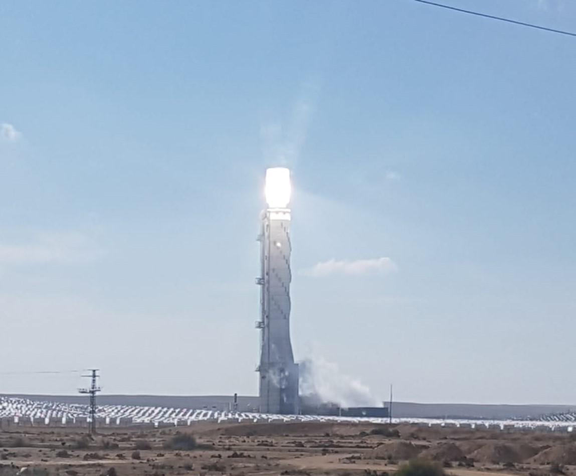 מגדל השמש שבתחנת הכוח התרמו-סולארית באשלים